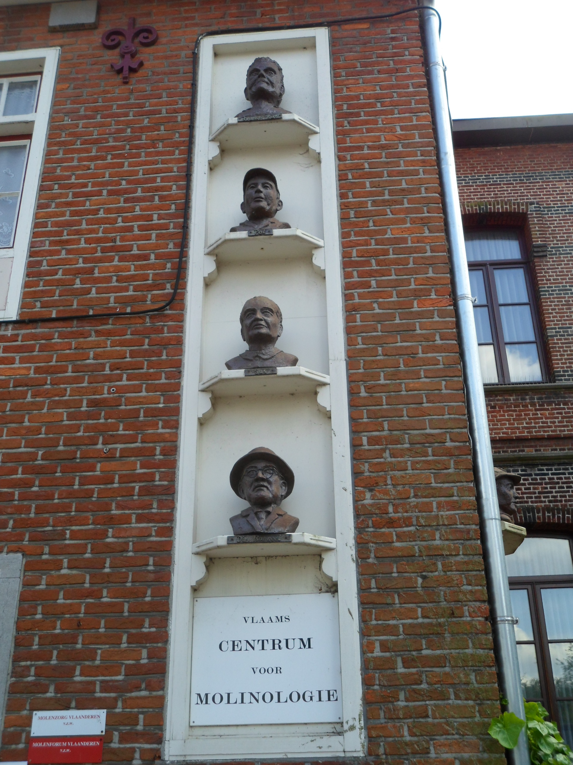 Bord van Vlaams centrum voor molinologie